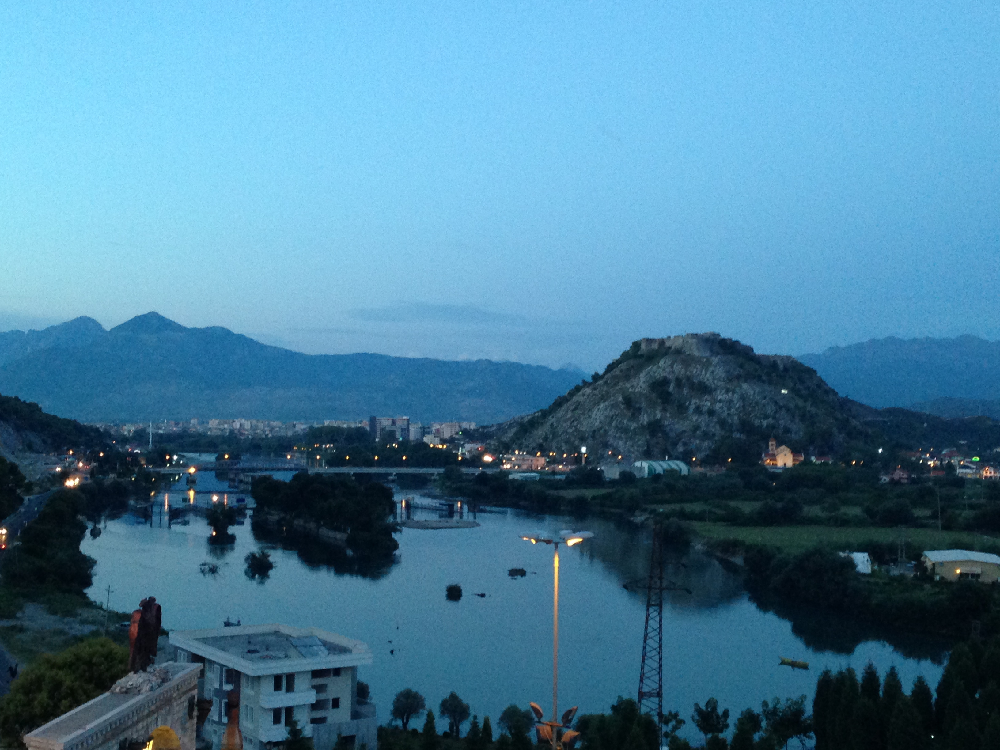 Buna e Rozafa